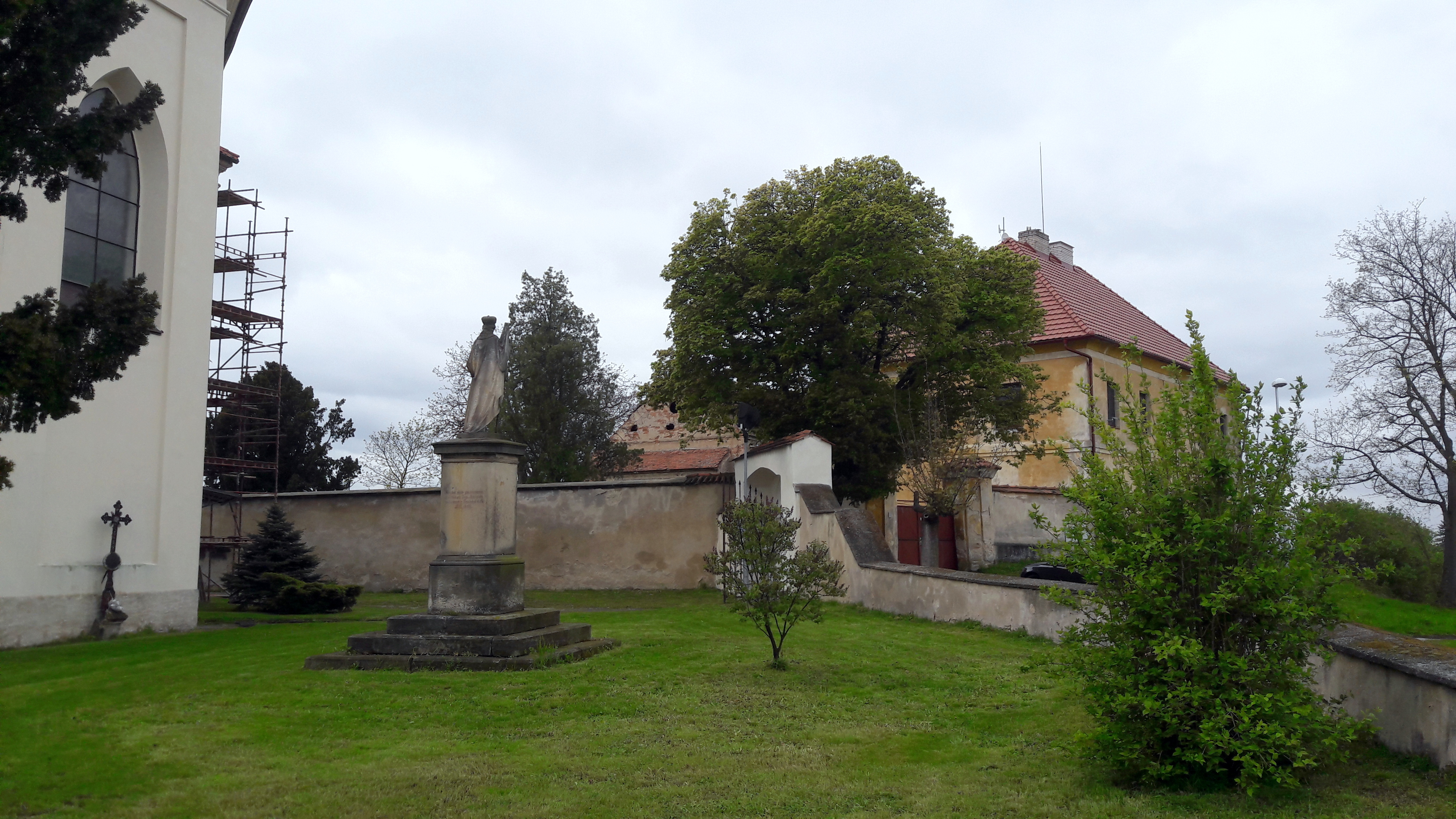 Sadská